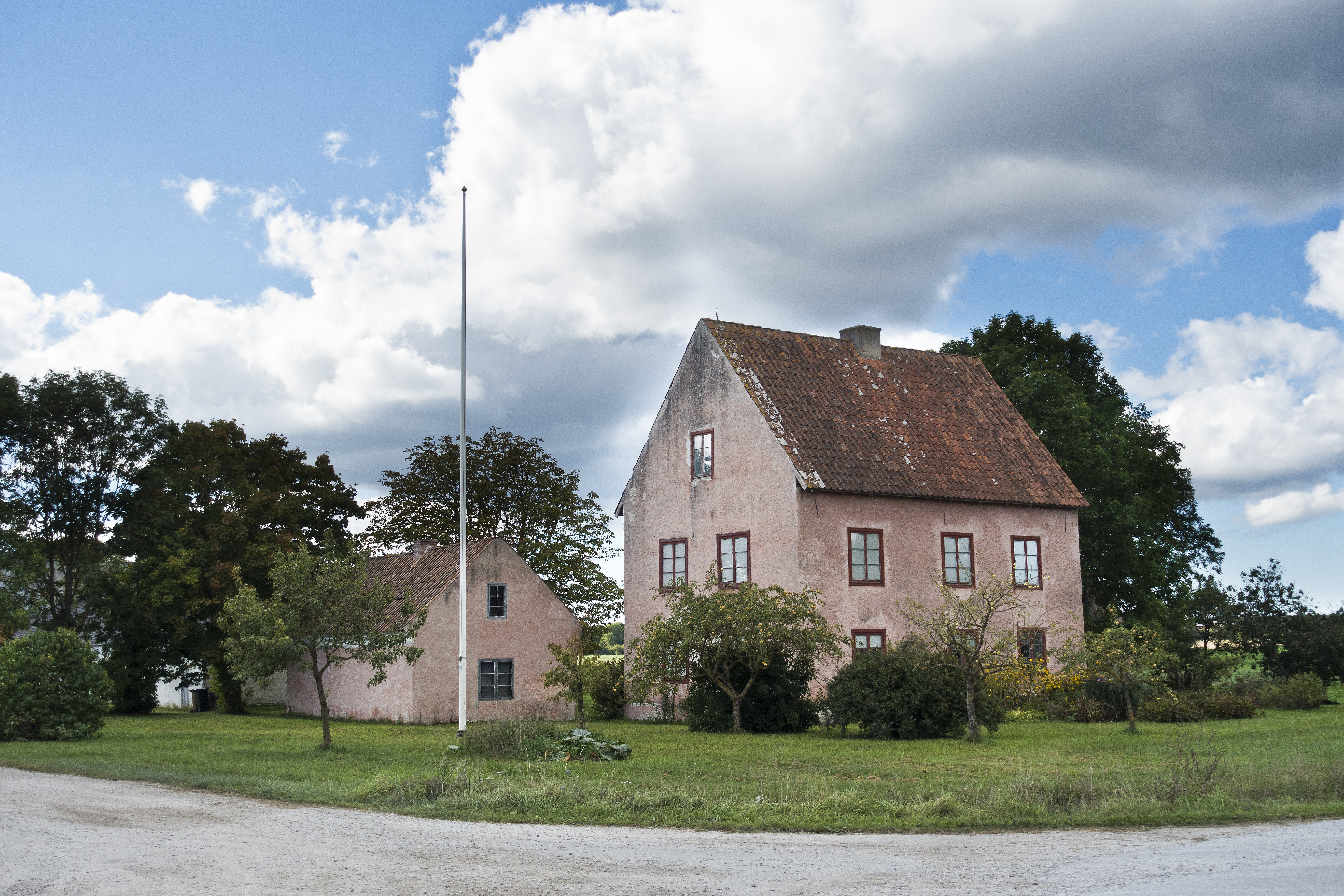 Huvudbyggnaden är en smal, hög manbyggnad i två våningar av sten, med rosa spritputsad fasad, under tegeltak. Huset är byggt i två omgångar, övervåningen tillkom möjligen 1770.